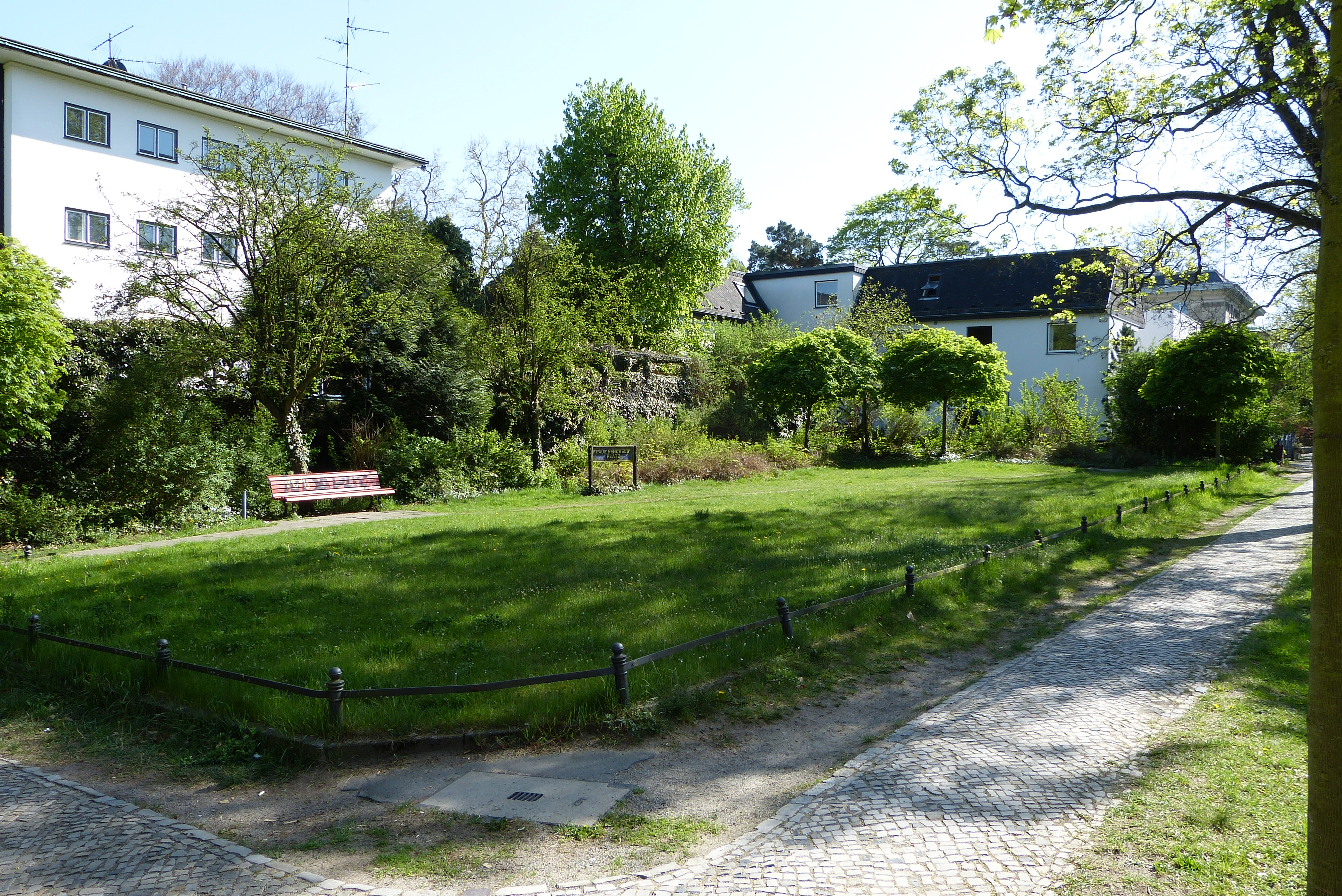 Berlin-Steglitz, Paul-Henckels-Platz, Ecke Schmidt-Ott-Straße/ Carl-Heinrich-Becker-Weg